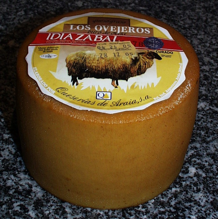 Queso Idiazabal Taken by myself, Benutzer:Ardo Beltz, on 2005-02-24 --Ardo Beltz 18:09, 24 Feb 2005 (UTC)